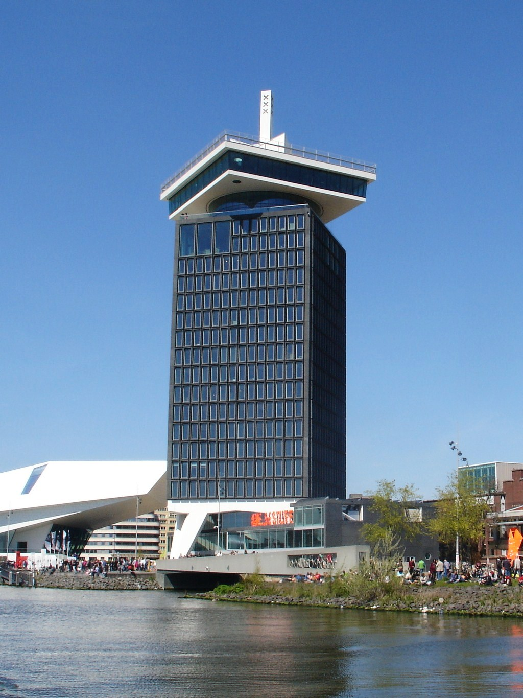 A'DAM Toren, voormalige Toren Overhoeks, Amsterdam-Noord